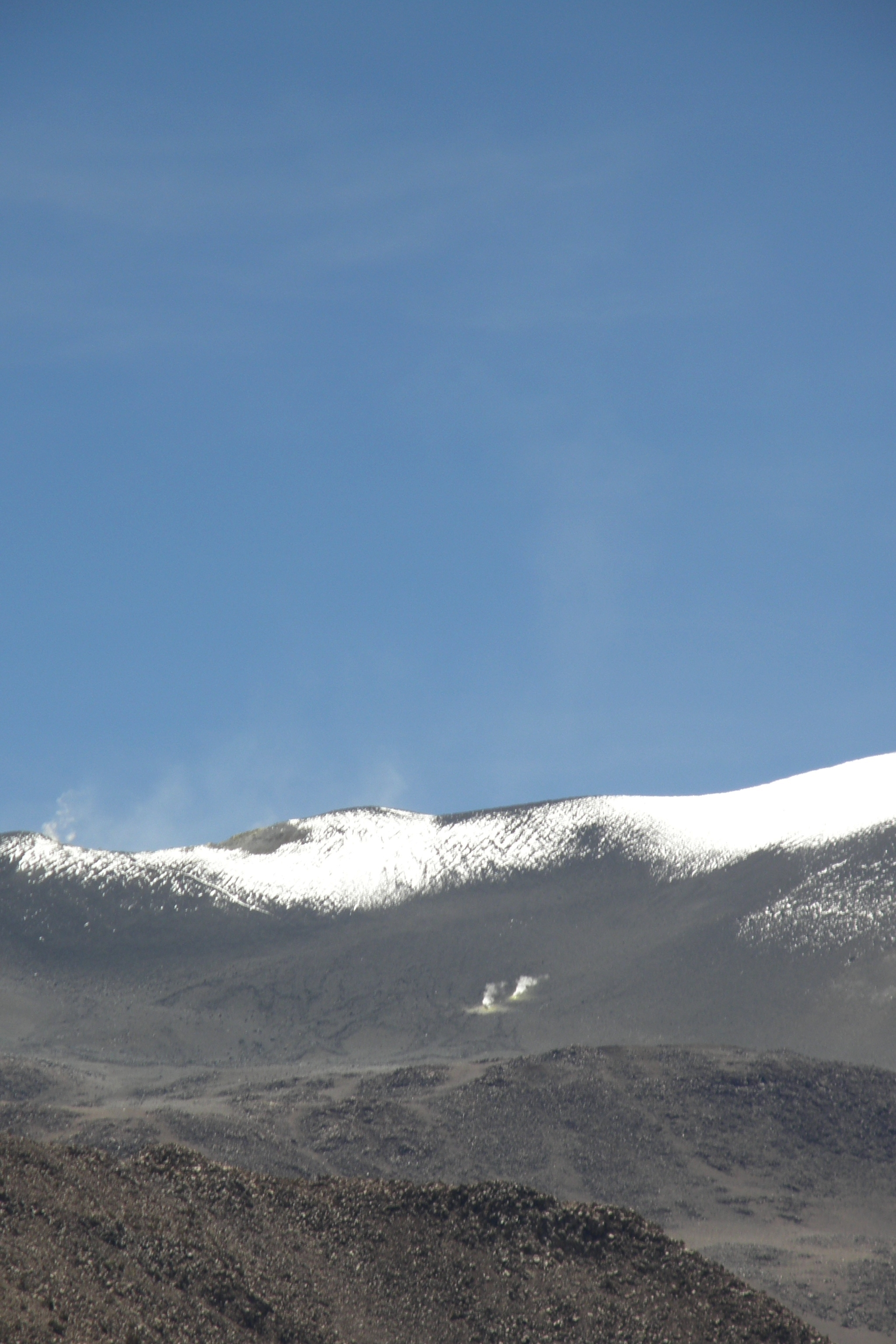 Volcan Isluga 5530m. Commune de Colchane, province de Tamarugal, région de Tarapacá, Chili